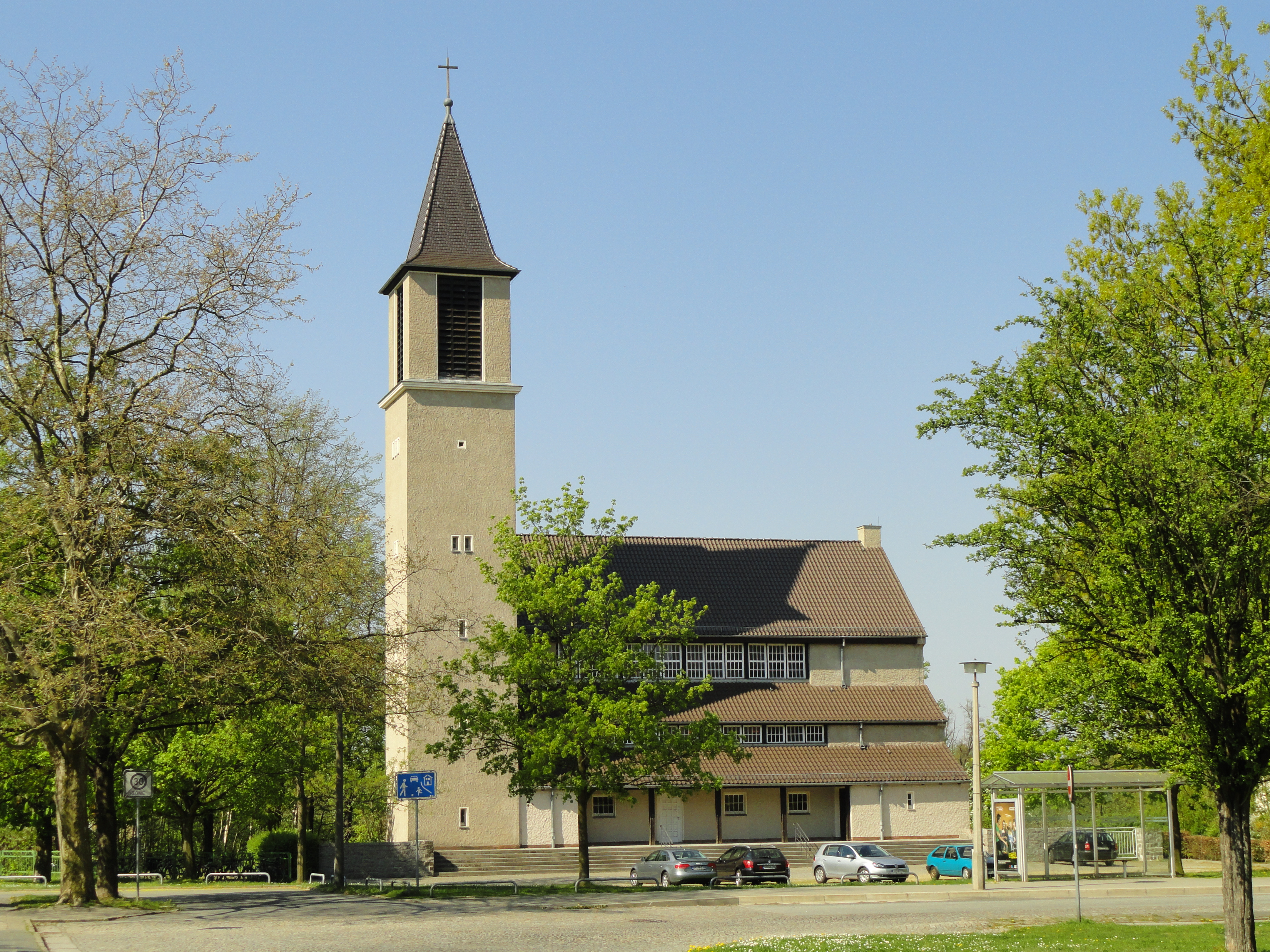 Christuskirche am Diesterwegplatz in Görlitz-Rauschwalde aus Richtung Osten